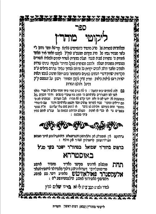 שער הספר ליקוטי מוהר"ן כפי שהודפס בהדפסה הראשונה